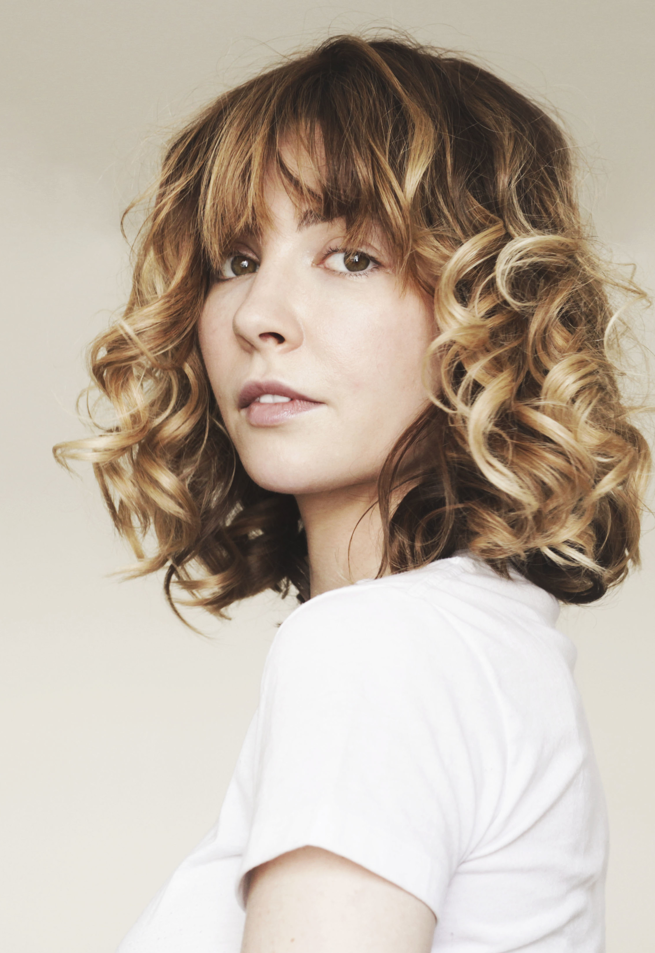 L' actrice Alix Bénézech en 2017